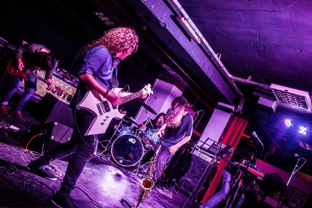 Fake Prophet durante una presentación en vivo en Club Subterráneo. Santiago de Chile. (27 de enero de 2015)